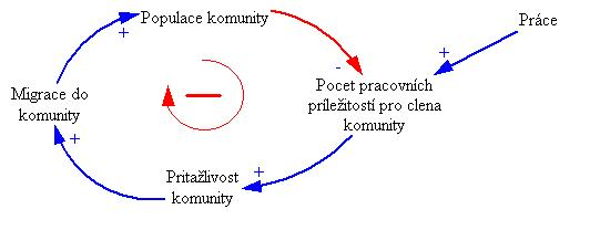 Kauzální diagram pro pročet pracovních míst v komunitě.